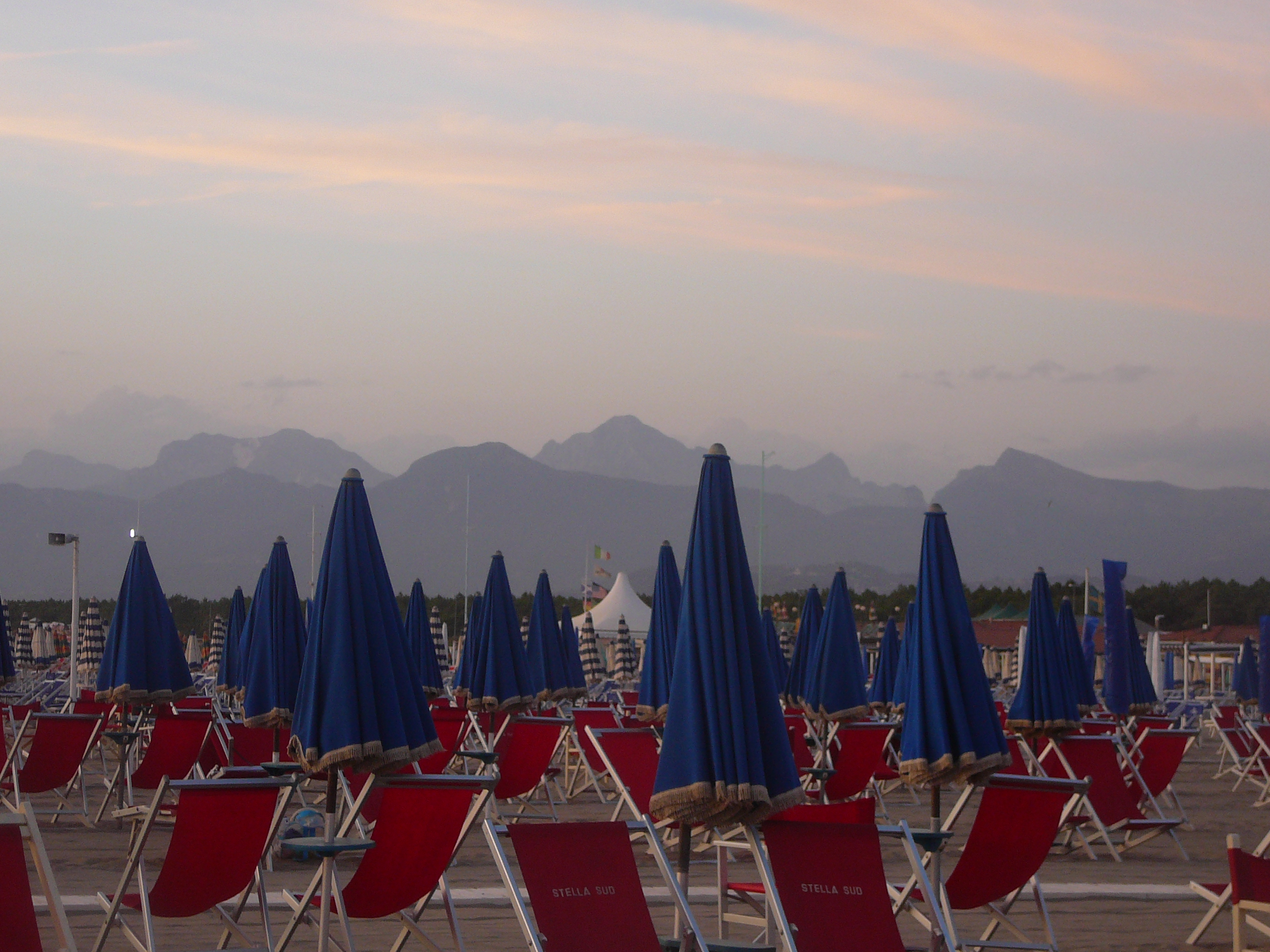 Spiaggia di Torre del Lago Puccini (Viareggio)